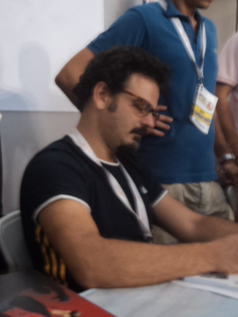 Luigi Sinis a Narnia Fumetto 2012.